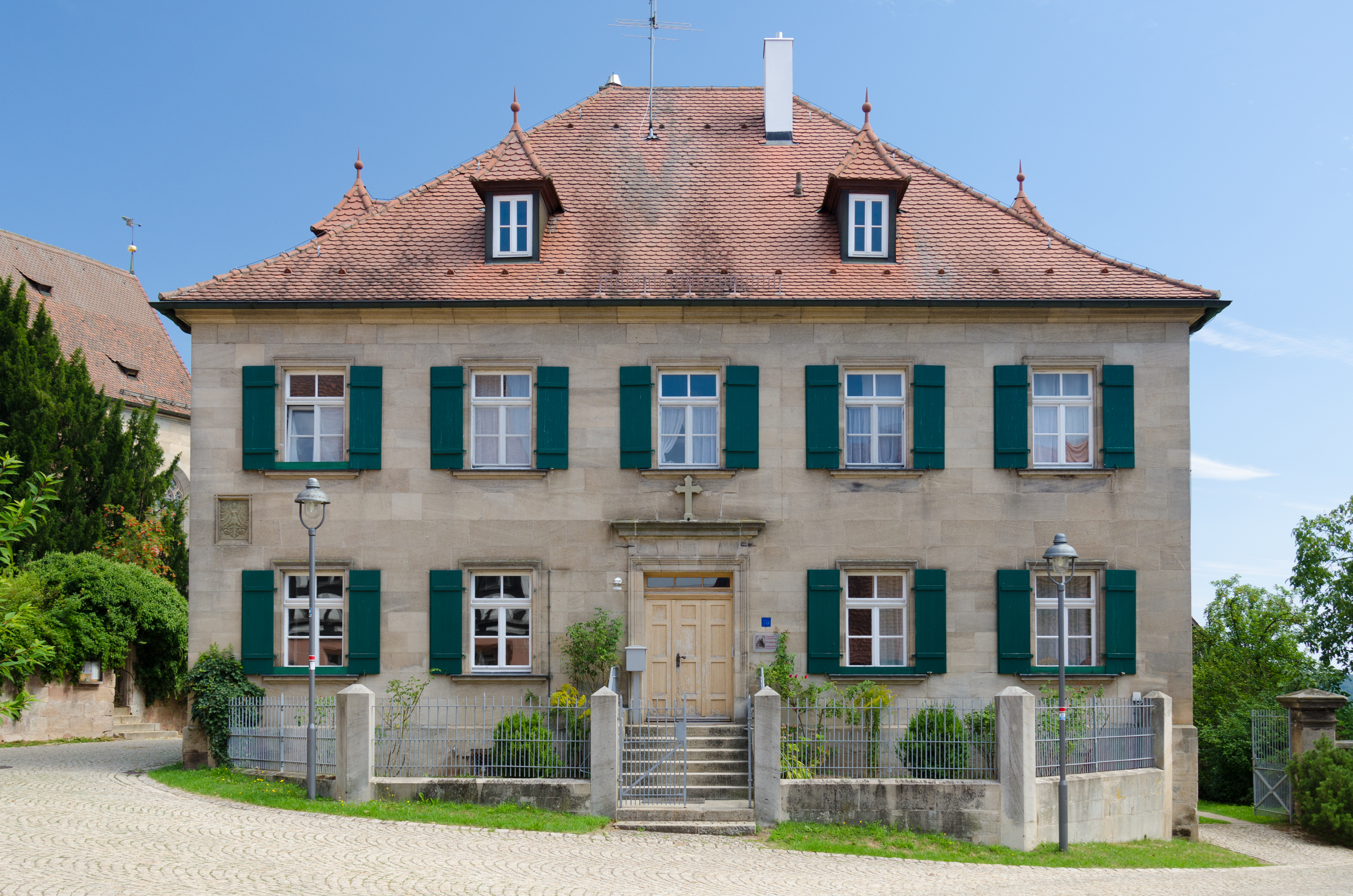 Absberg, Kalbensteinber, Haus Nr. 70